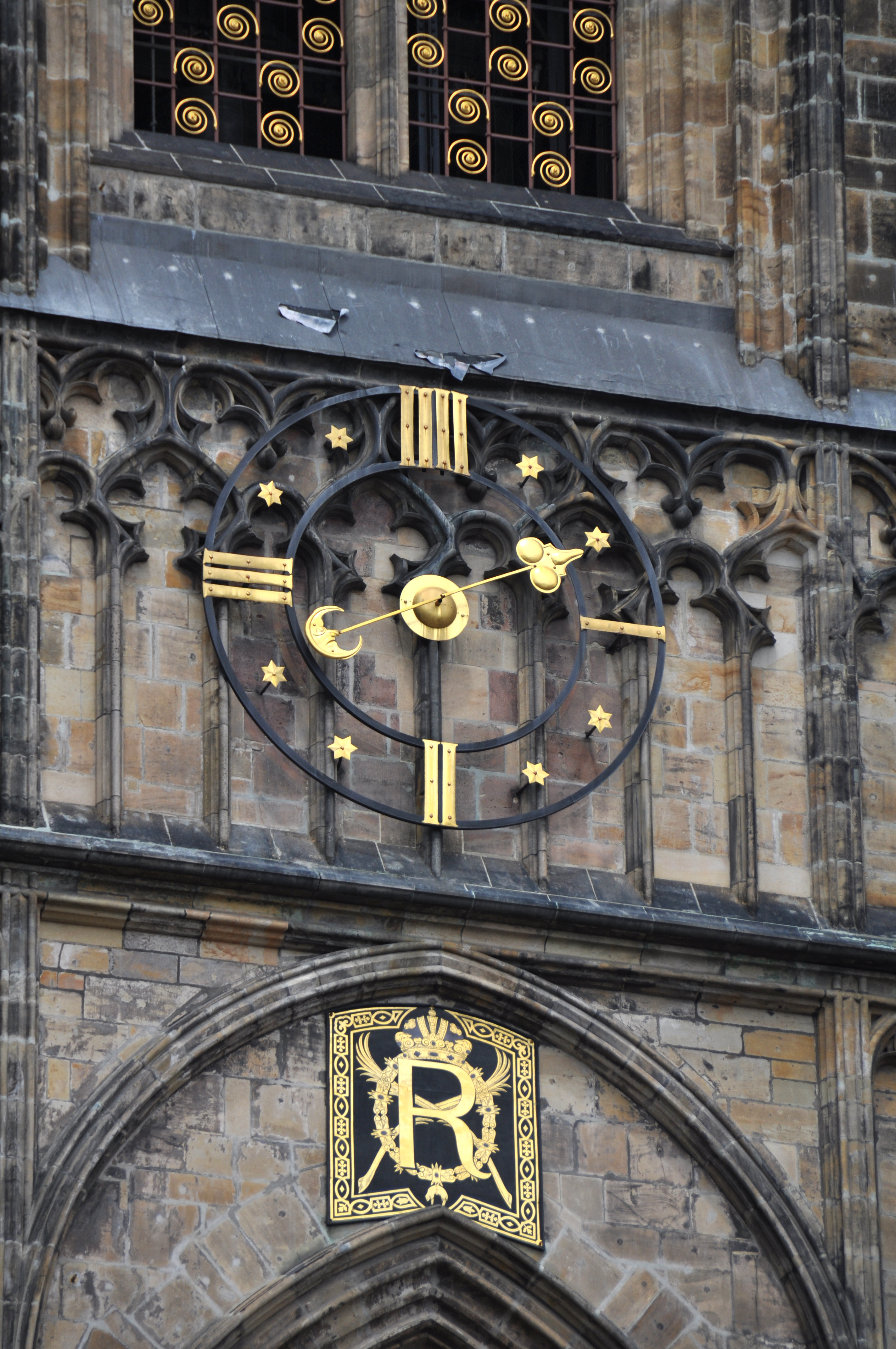 Prag